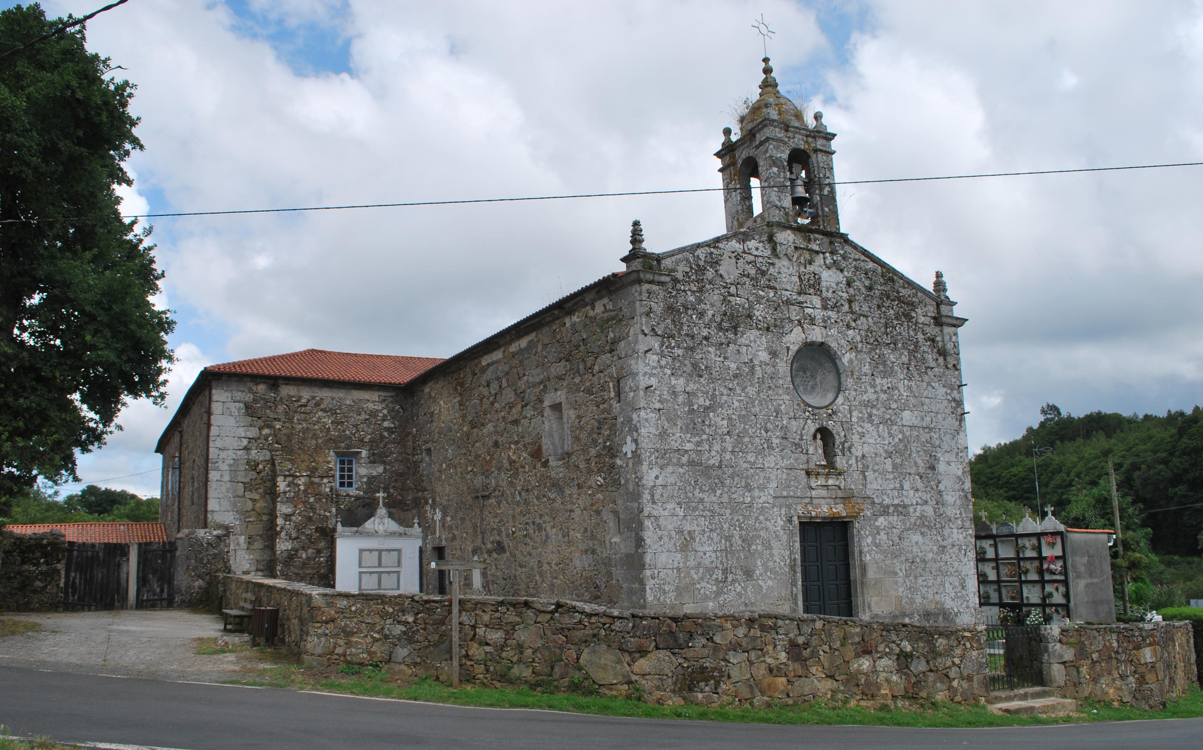 Vista da igrexa de Laxe en Armental, Vilasantar